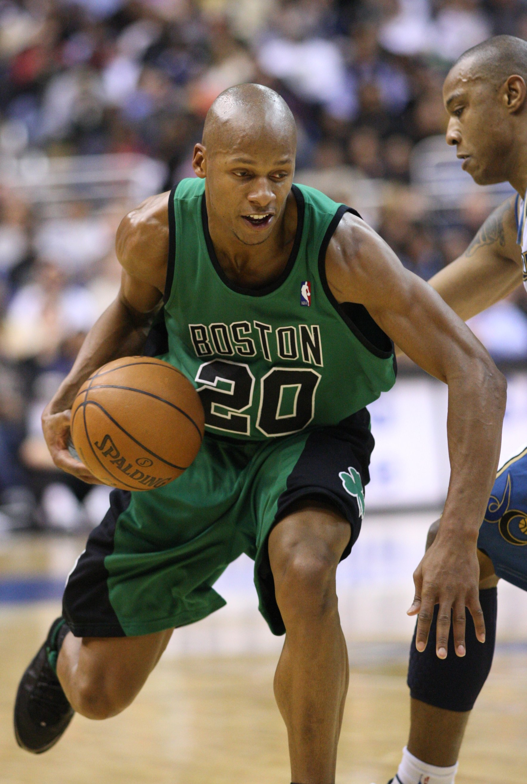 Ray Allen